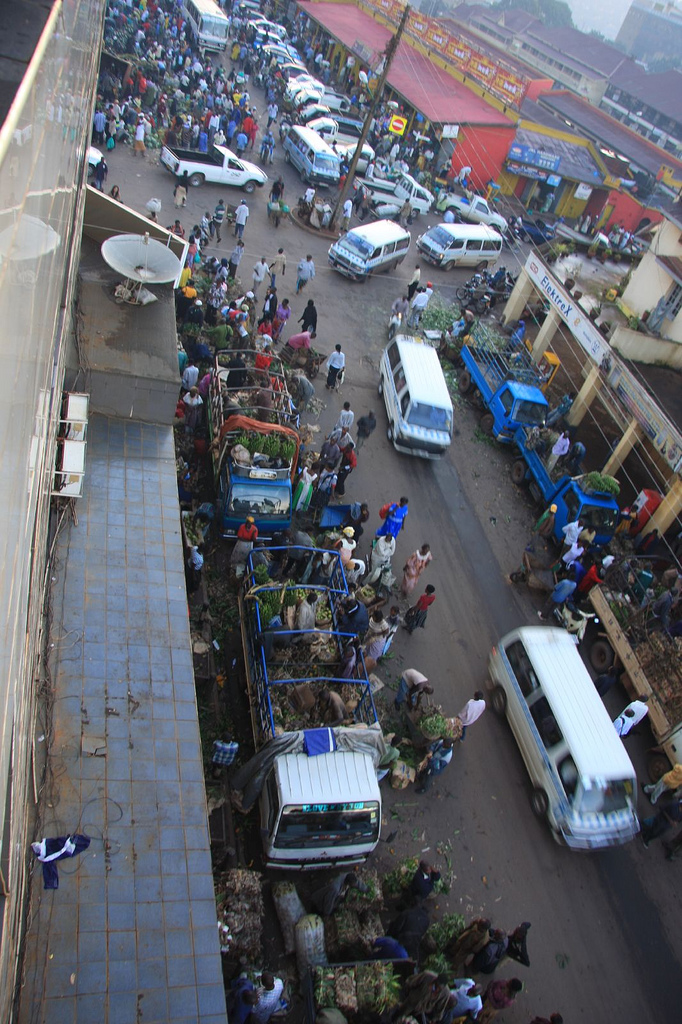 Utsikt från hotellfönstret en måndagsmorgon